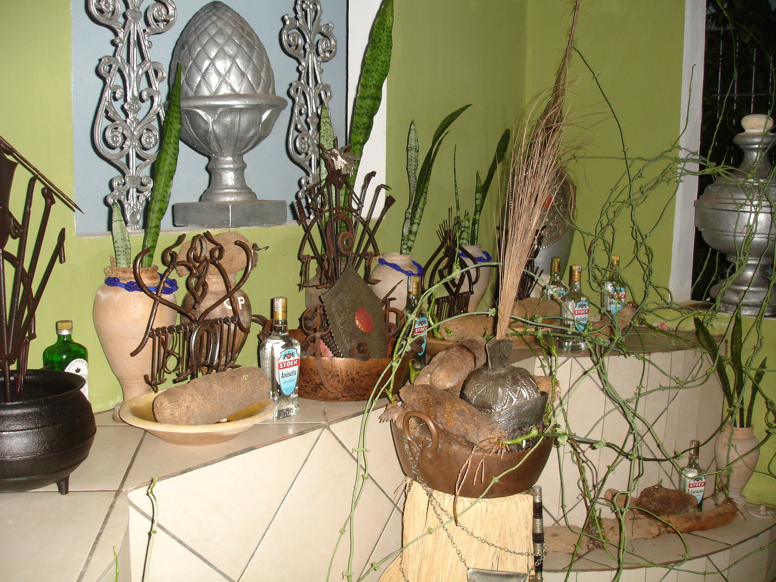 Acentamento de Ogum